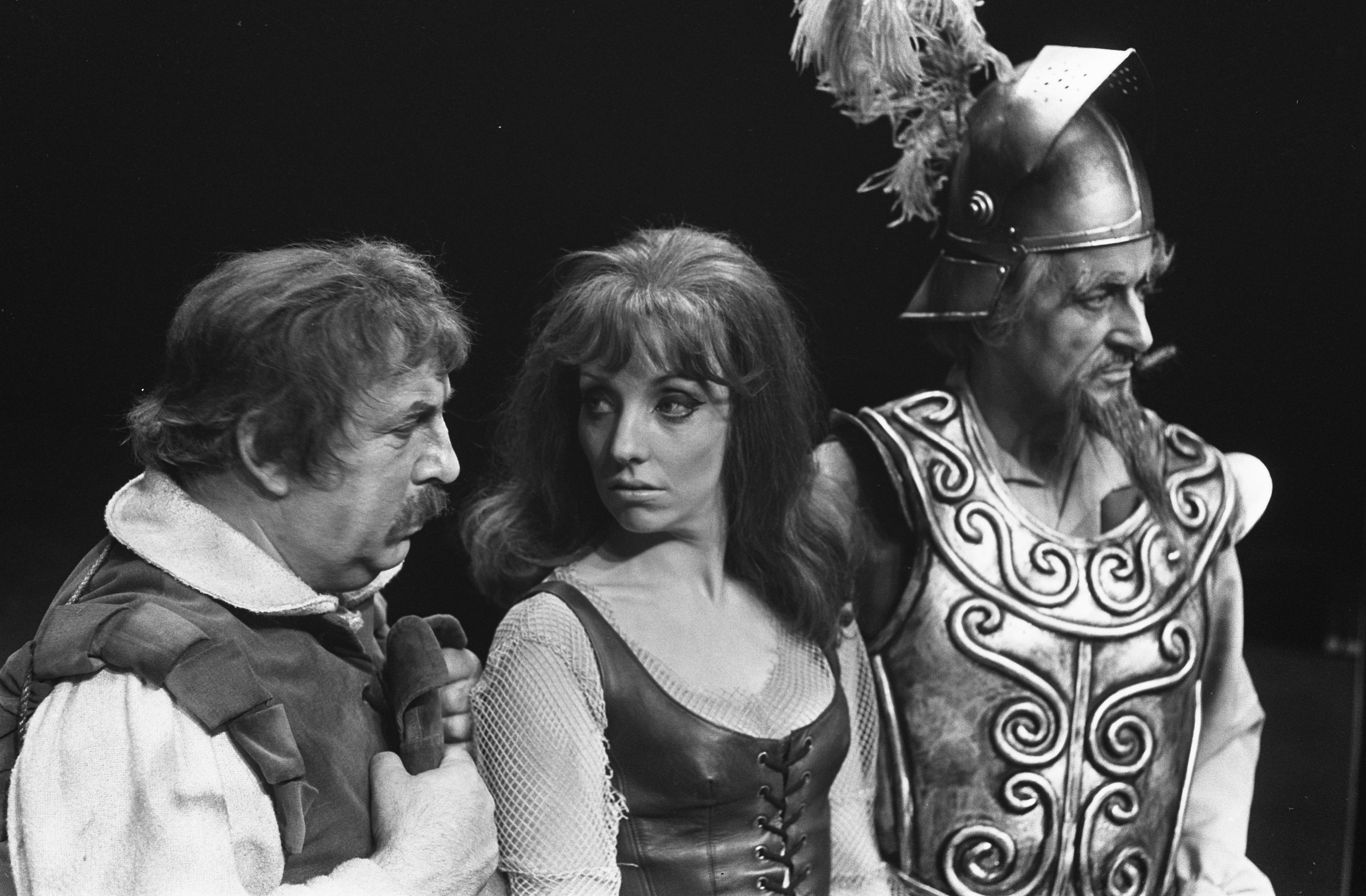 Collectie / Archief : Fotocollectie Anefo Reportage / Serie : Repetitie in kostuum van "De Man van La Mancha " Beschrijving : Lex Goudsmit (als Sancho Panza), Carry Tefsen (als Dulcinea) en Guus Hermus (als Don Quinchotte) Datum : 19 december 1968 Trefwoorden : repetities Persoonsnaam : Goudsmit, Lex, Hermus, Guus, Tefsen, Carry Fotograaf : Fotograaf Onbekend / Anefo Auteursrechthebbende : Nationaal Archief Materiaalsoort : Negatief (zwart/wit) Nummer archiefinventaris : bekijk toegang 2.24.01.05 Bestanddeelnummer : 921-9540